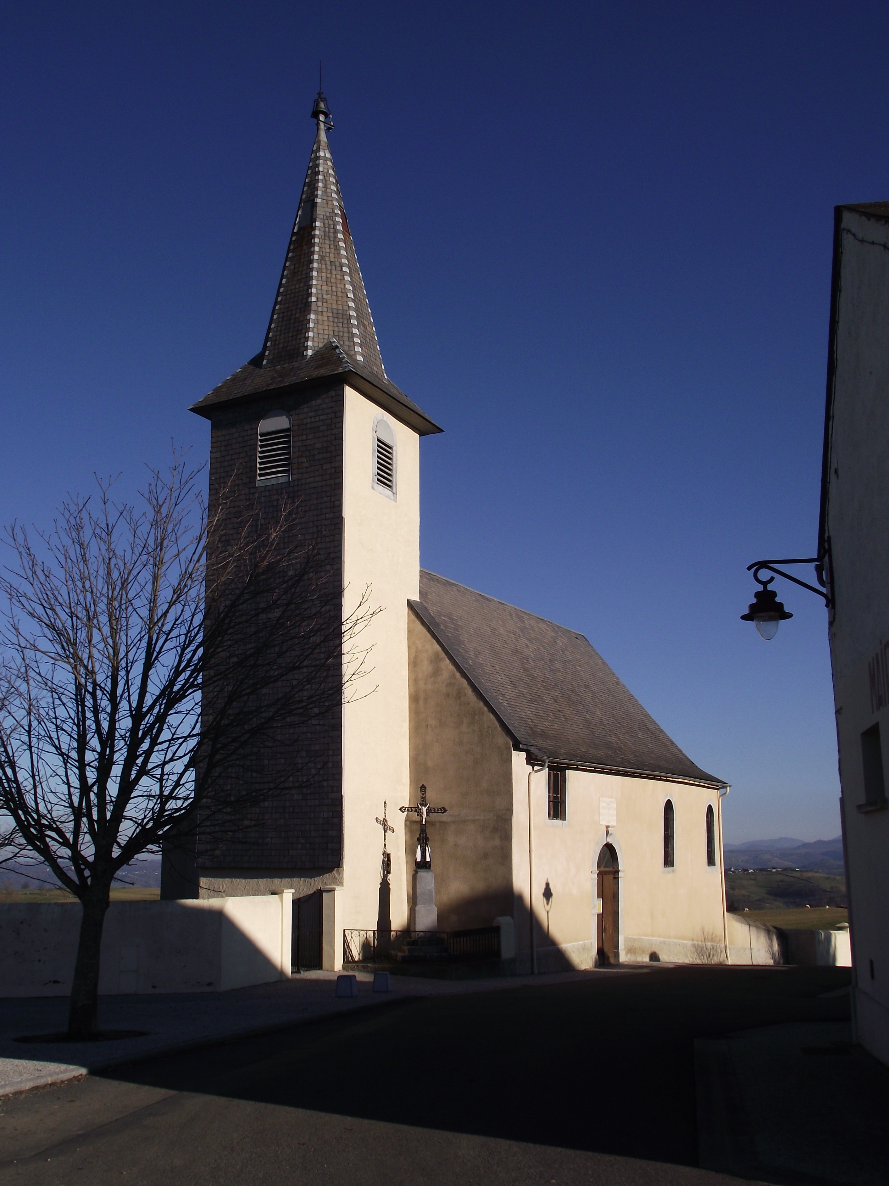 Église de Mérilheu (Hautes-Pyrénées, France)